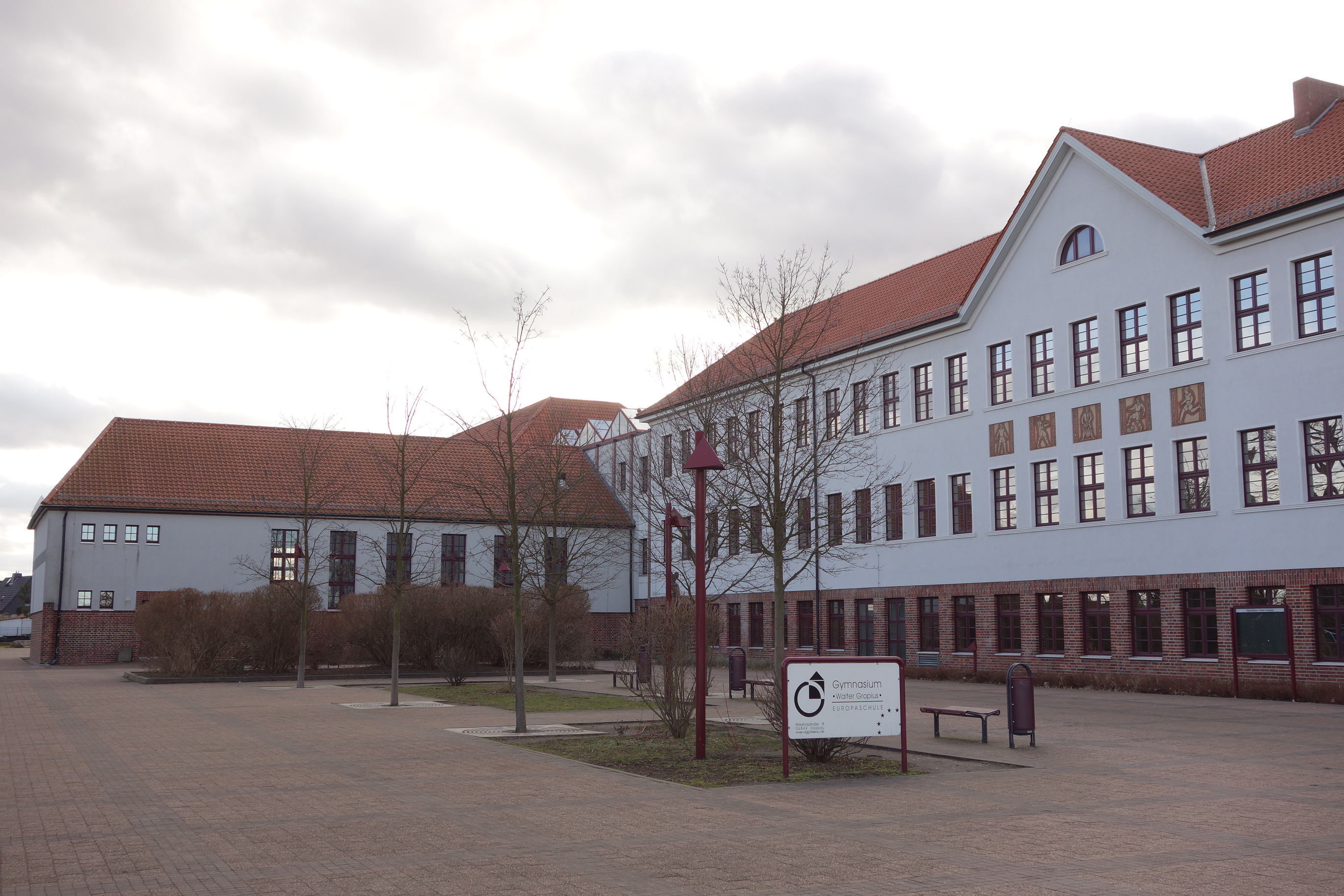 Gymnasium Walter Gropius Dessau, Hauptgebäude